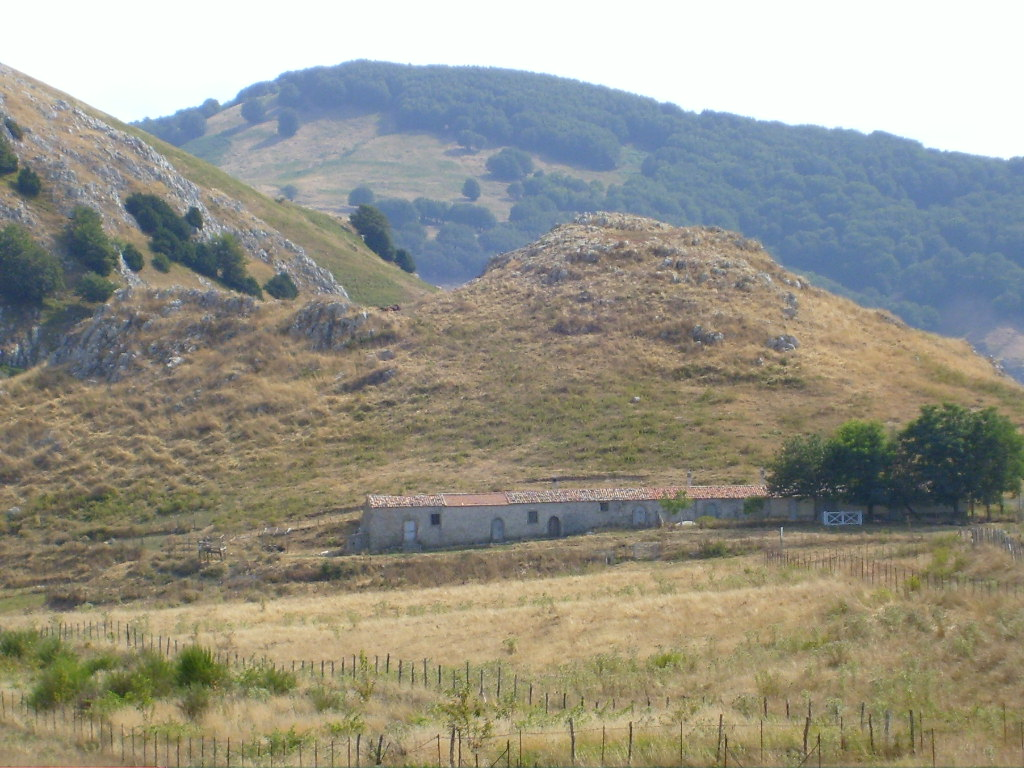 Tipico paesaggio nebroideo con cascinale